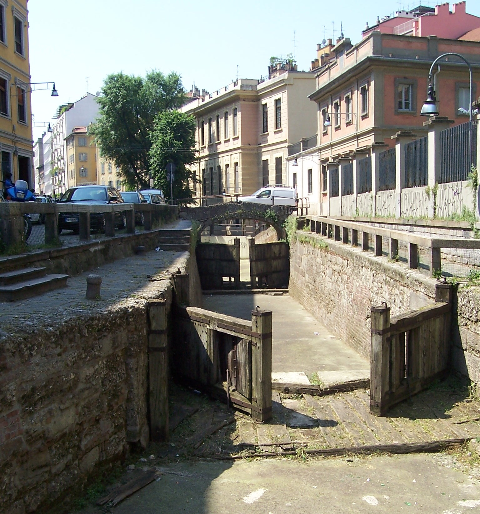 La Conca dell'Incoronata NEL 2010. Si Attende il Restauro